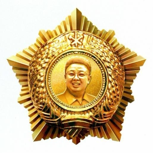 Order of Kim Jong-il